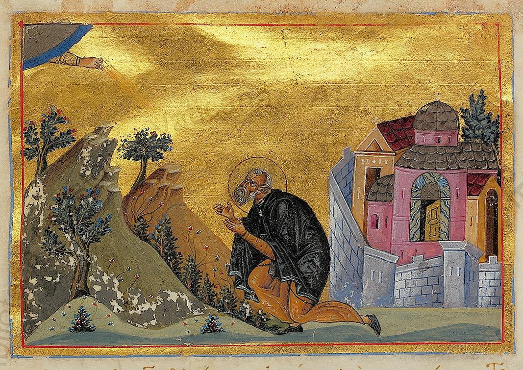 Иоанн Молчальник Константинополь. 985 г. Миниатюра Минология Василия II. Ватиканская библиотека. Рим.